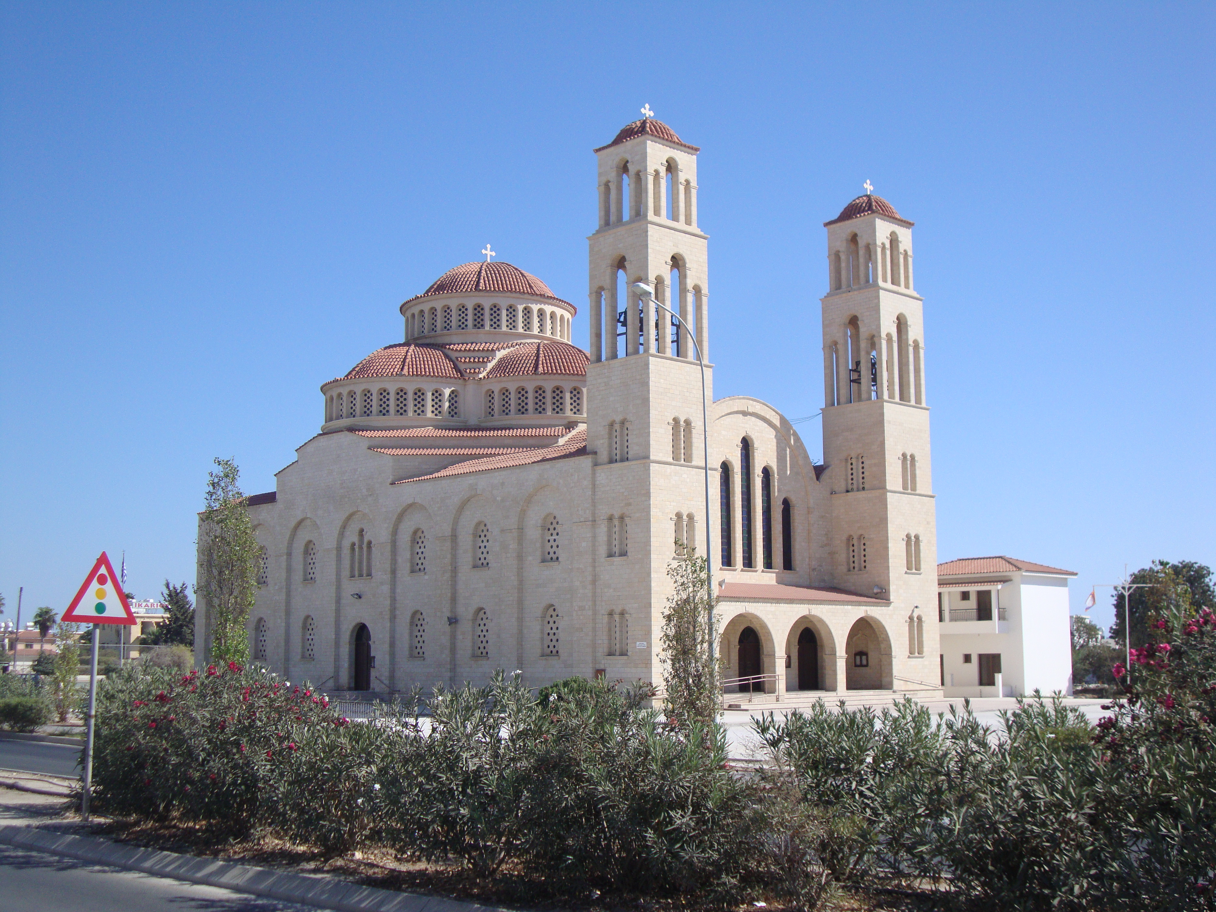 Храм Святых Бессребреников Косьмы и Дамиана. Пафос. 09.2013.